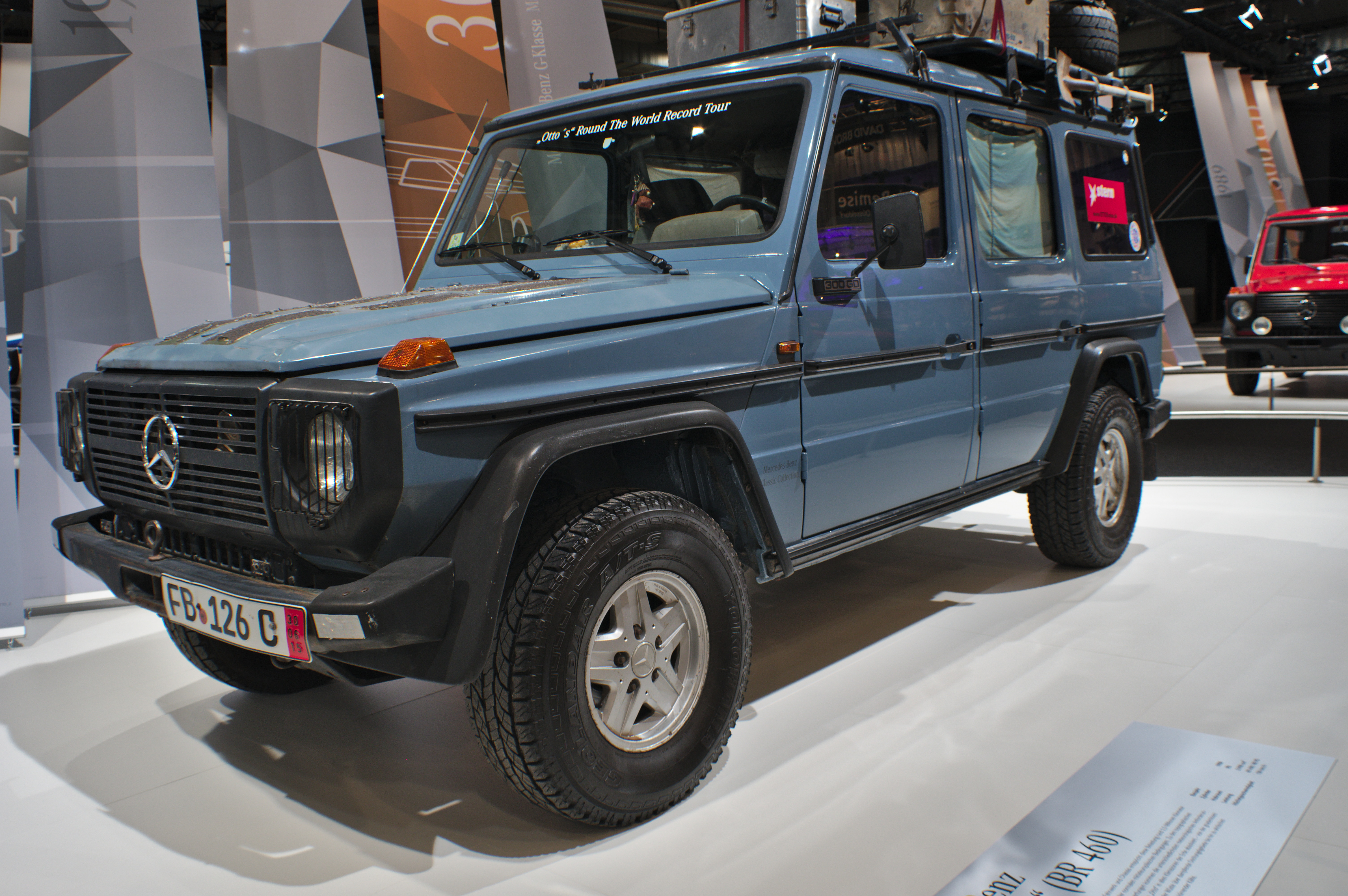 Techno Classica 2018